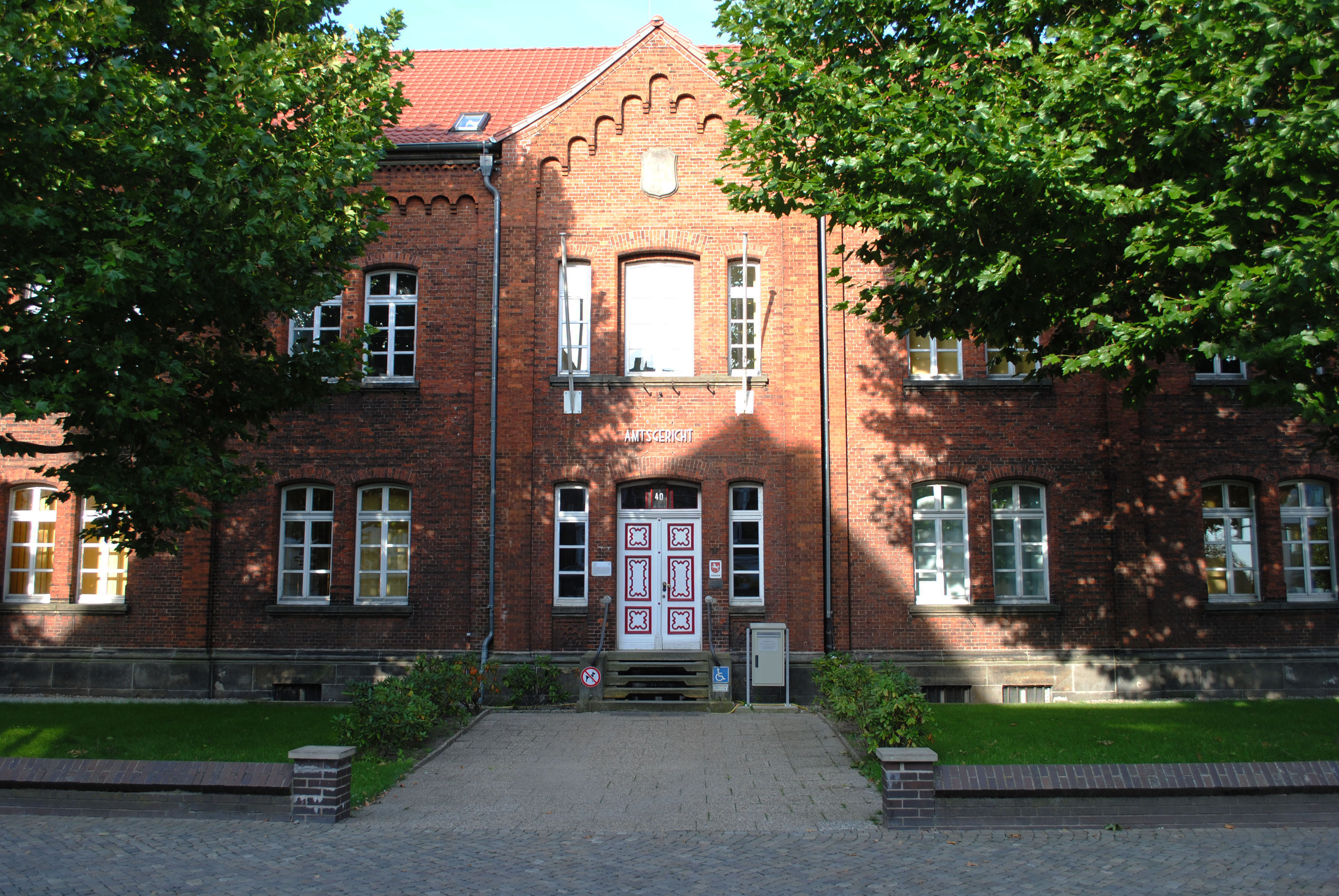 Obernstraße 40, am südlichen Ende der Fußgängerzone, Haupteingangsfassade des Amtsgerichts